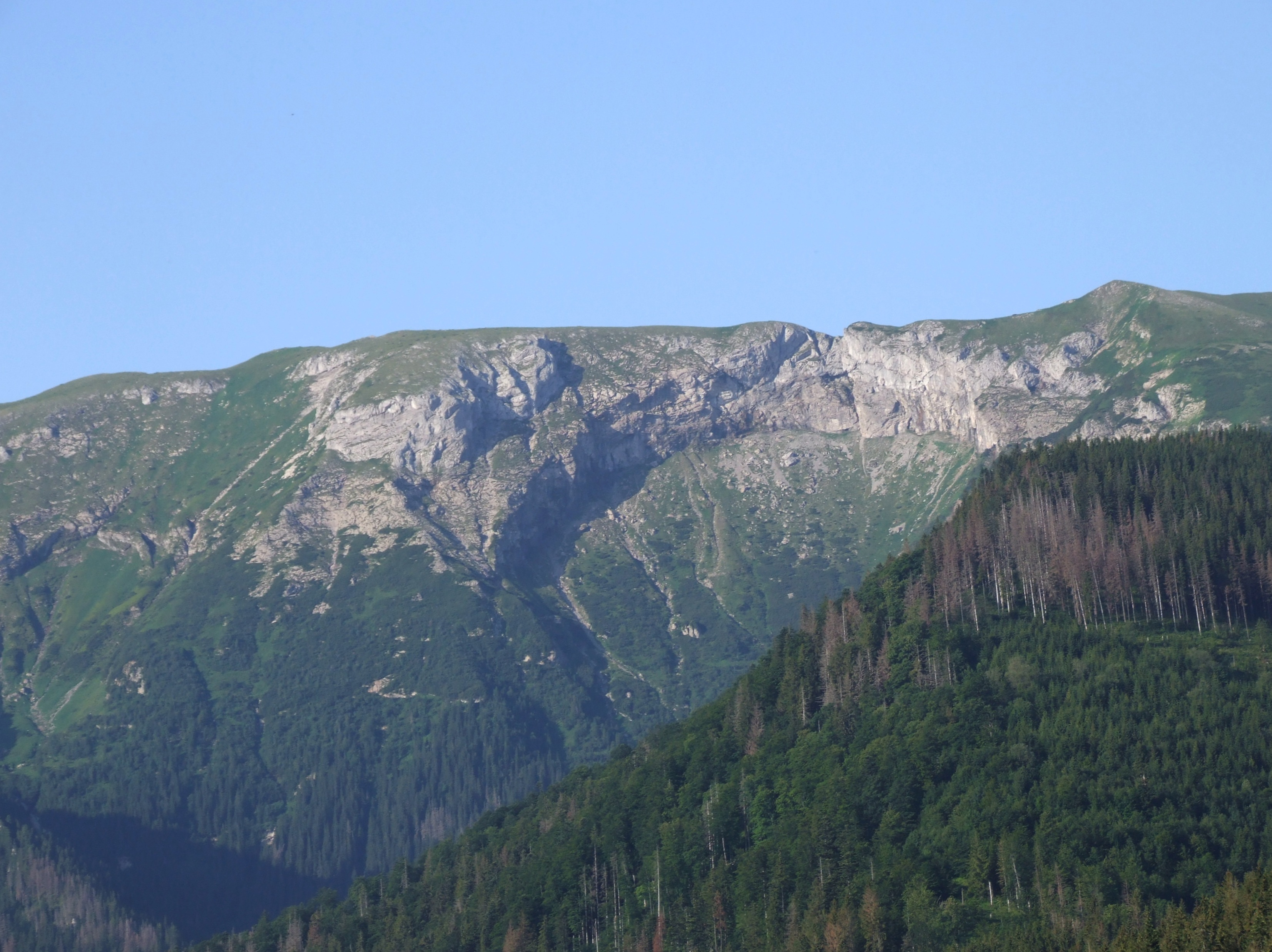 Wielki Koszar, widok ze Zdziaru. U góry Jatki Bielskie, z prawej strony zalesiona Jaworzynka Bielska